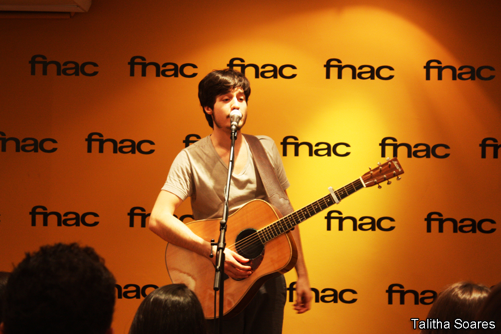 Tiago Iorc